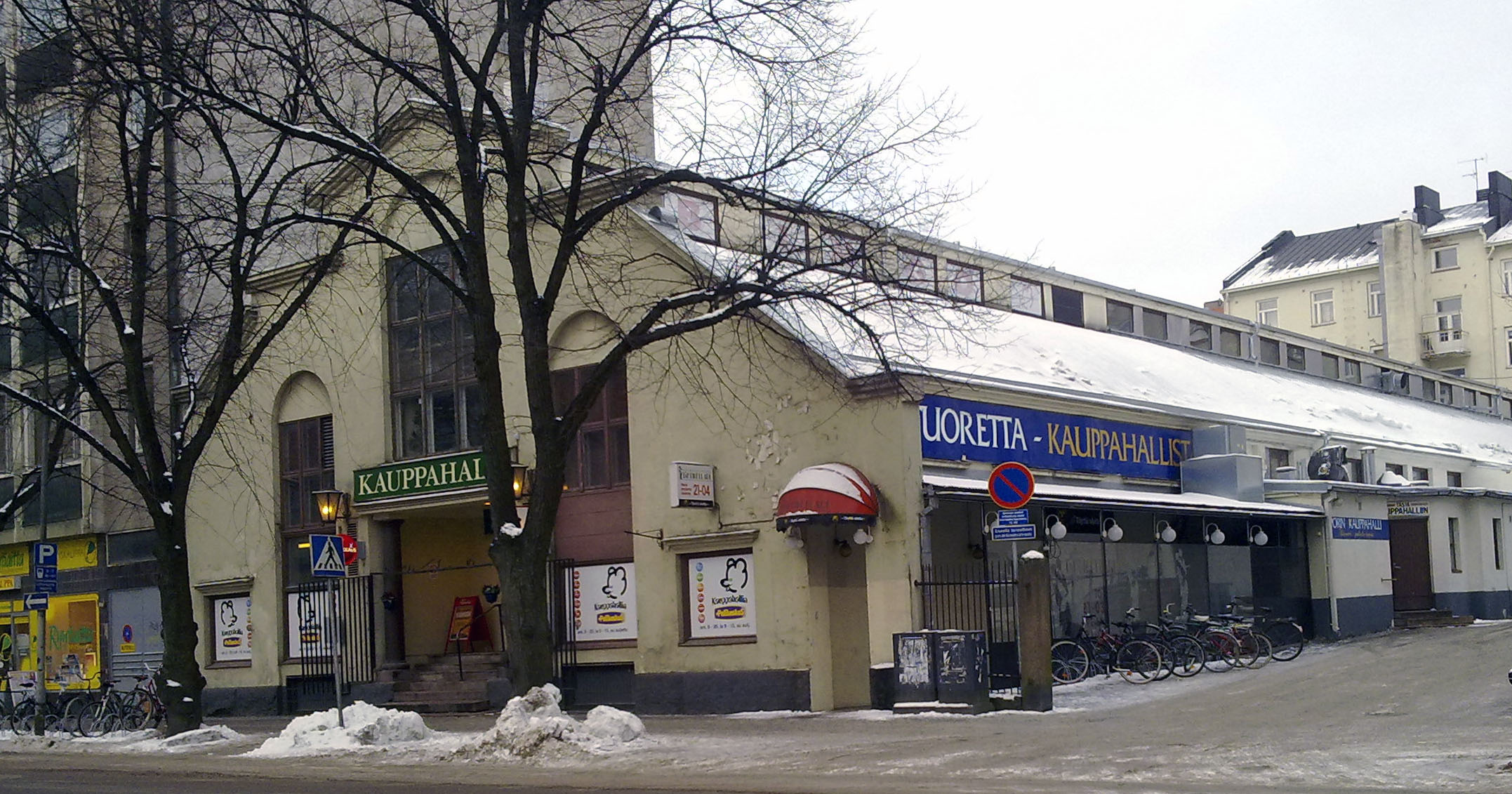 Porin kauppahalli kuvattuna Isolinnankadulta.